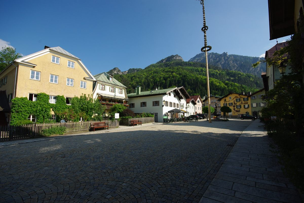 Ensemble Florianiplatz, Bad ReichenhallThis is a photograph of an architectural monument.